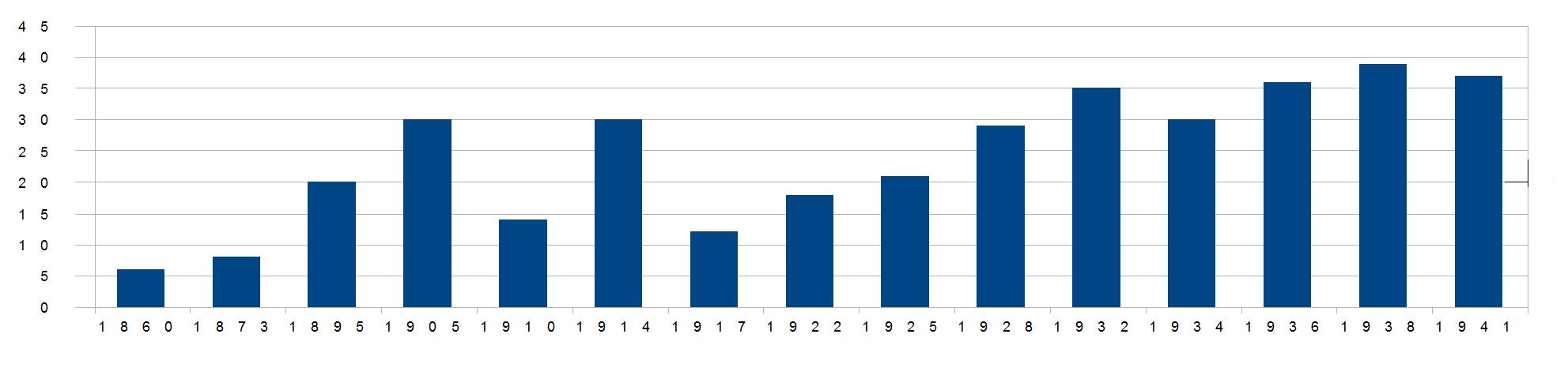 Diagramm der Verkehrsentwicklung vor dem Zweiten Weltkrieg der Bahnstrecke München-Salzburg